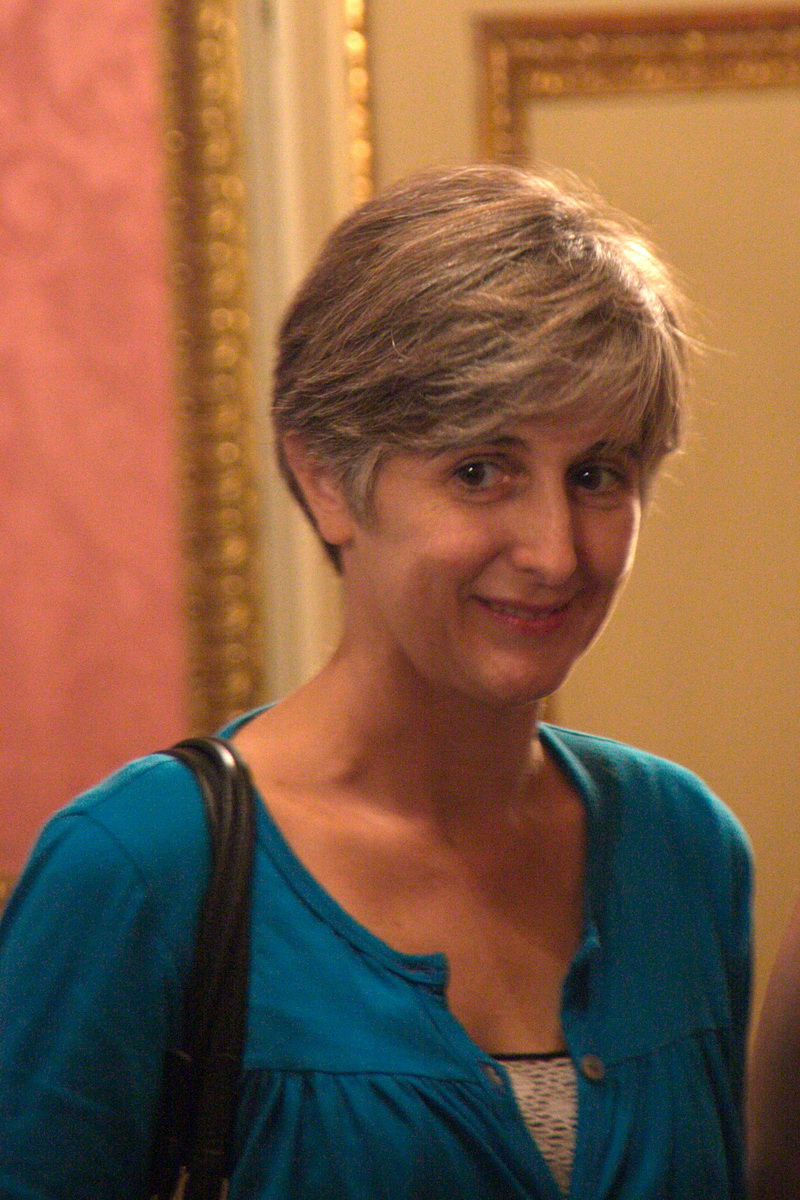 Dolors Camats a l'Acte de lliurament a Neus Català de la medalla d'Or al Mèrit Cívic de l'Ajuntament de Barcelona. 29-10-2014